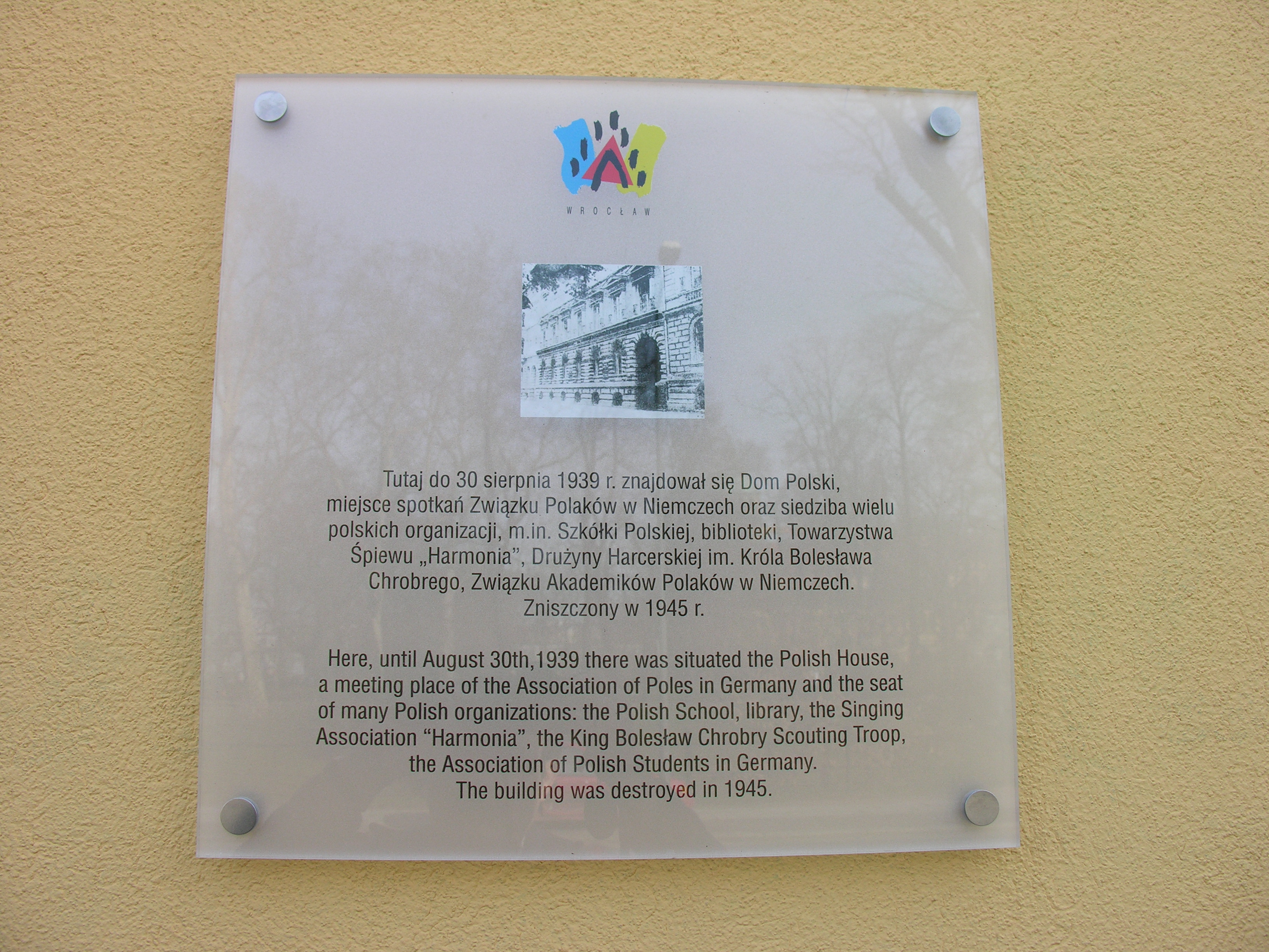 Tablica upamieniająca niezachowany Dom Polski we Wrocławiu, Wrocław, ul. Podwale